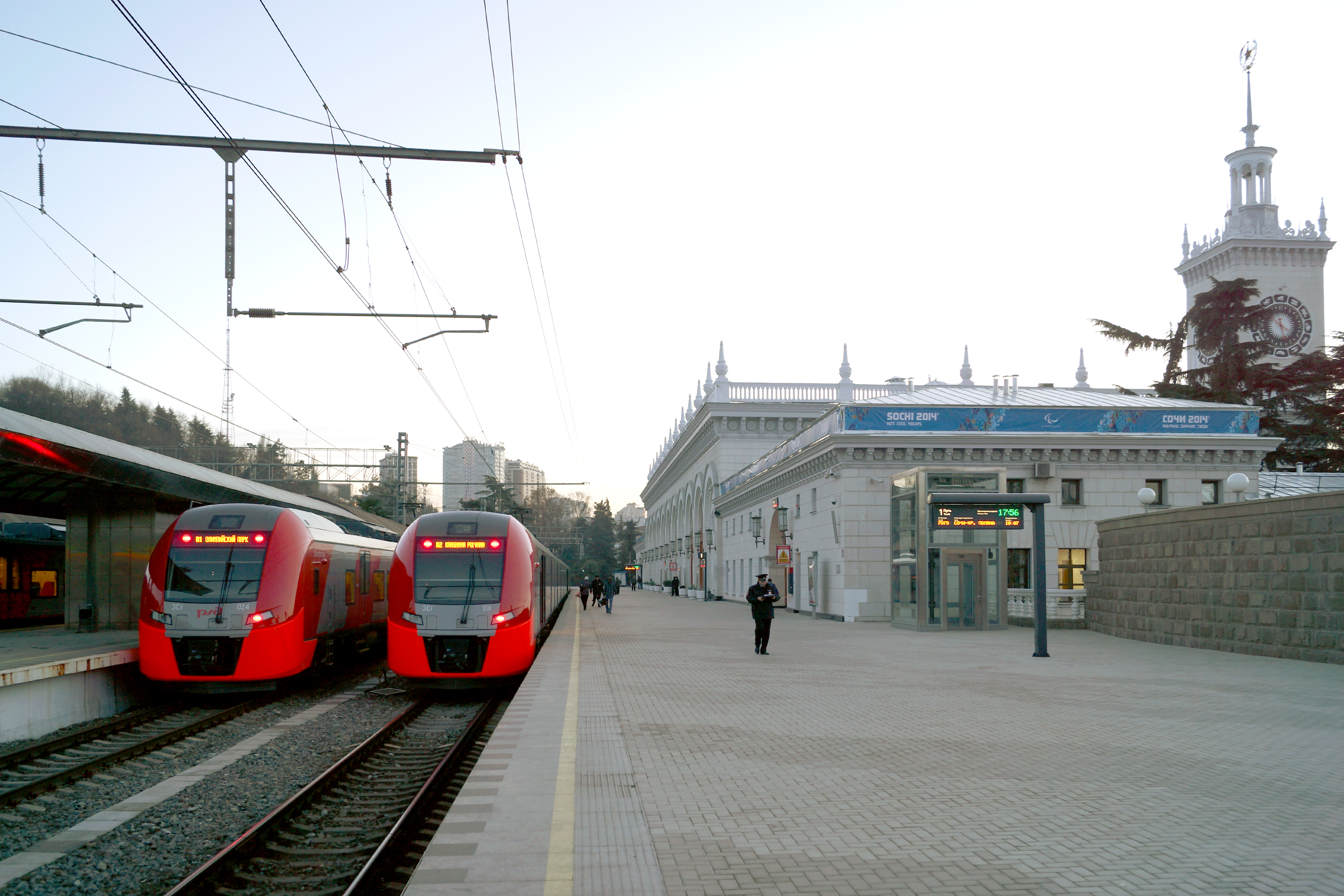 Электропоезда «Ласточка» у платформ железнодорожного вокзала Сочи